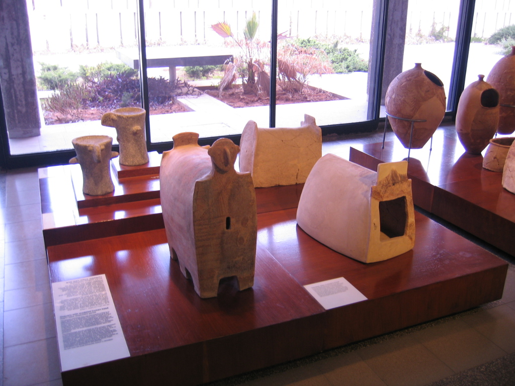 Eretz Israel Museum, Tel Aviv, Israel.